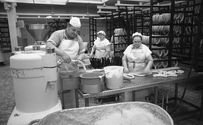 VW-Werk, Wolfsburg Wirtschaftsbetriebe